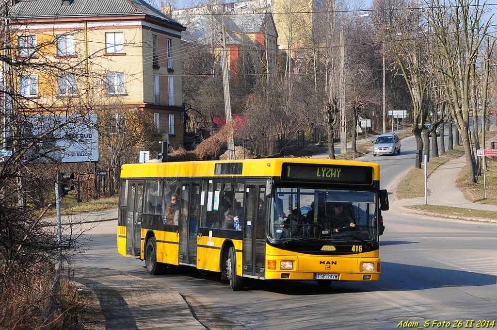 MAN NL202 w Skarżysku na linii 1